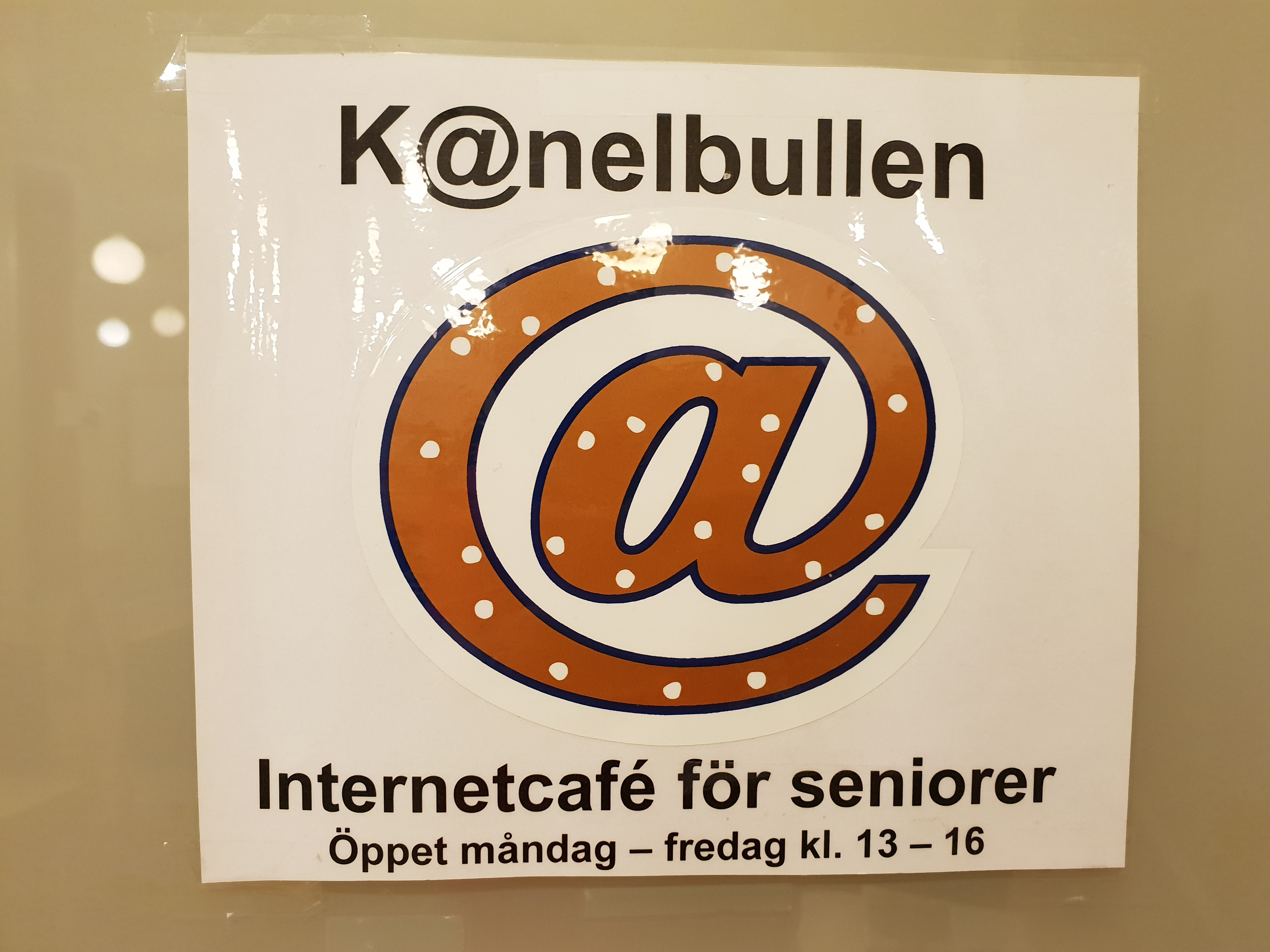 Kanelbulle som logo för Seniornet Södermalms internetcafé.